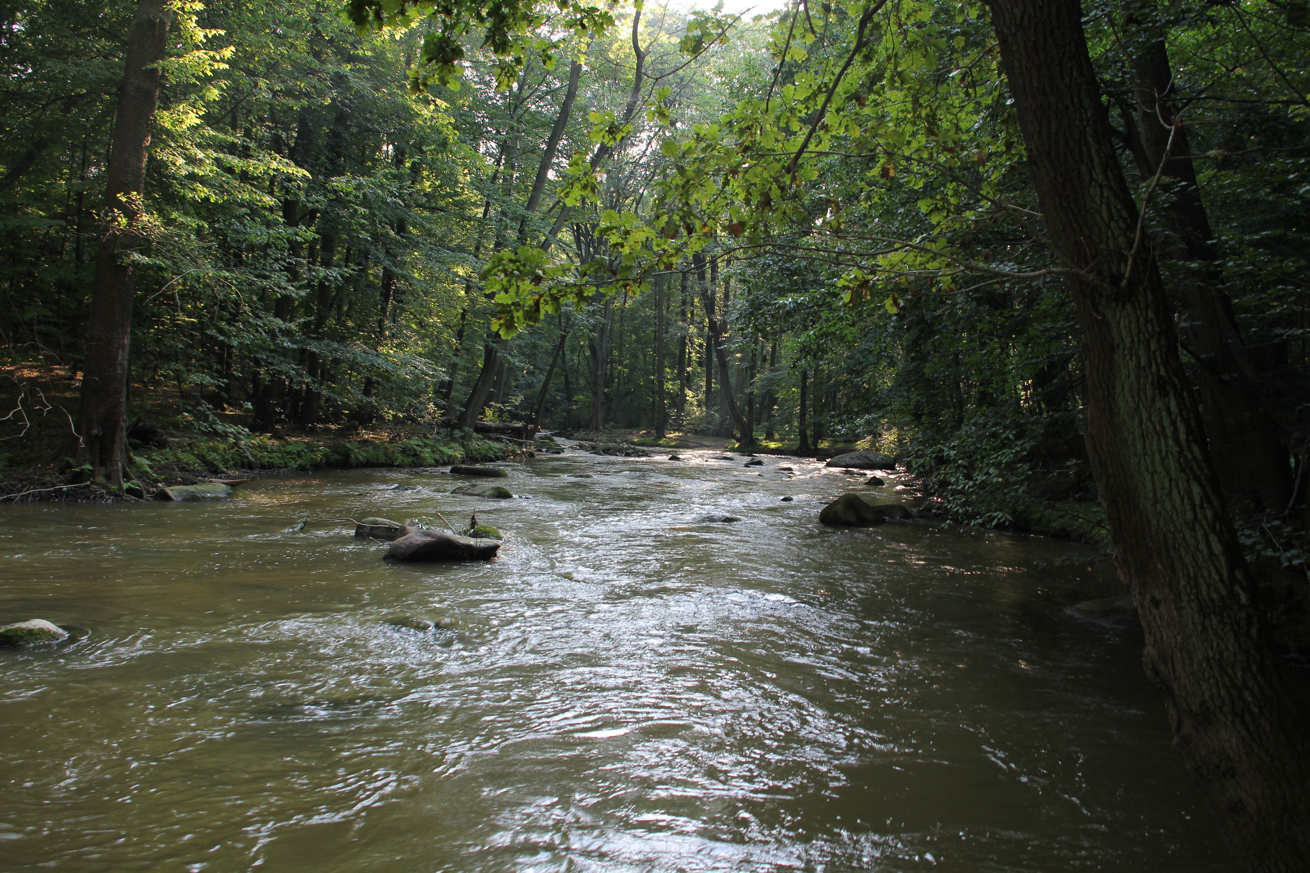 Spree am Humboldthain in Bautzen Hornjoserbsce: Sprjewja při Humboldtowym haju w Budyšinje